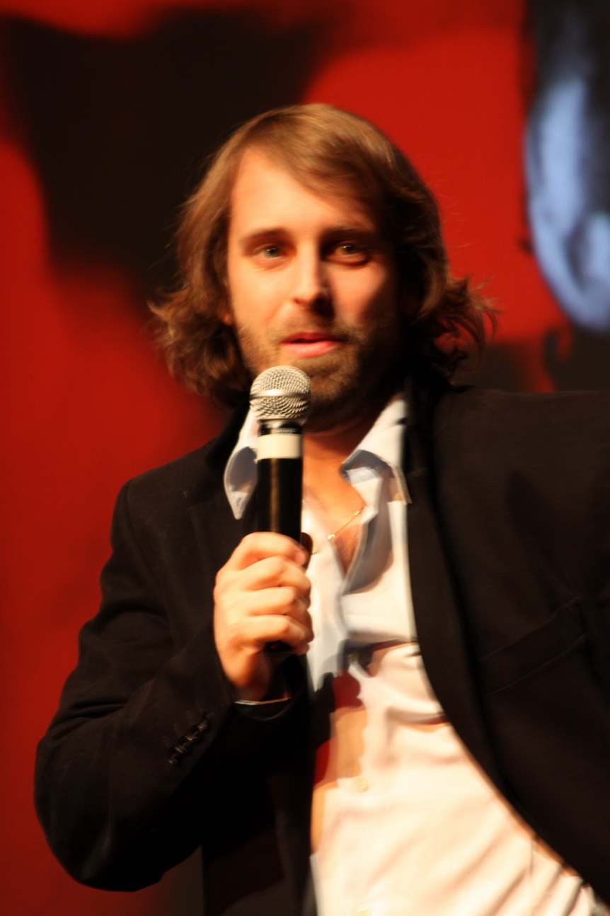 Alexandre Aja, présent lors du 18eme festival du film fantastique à Gerardmer